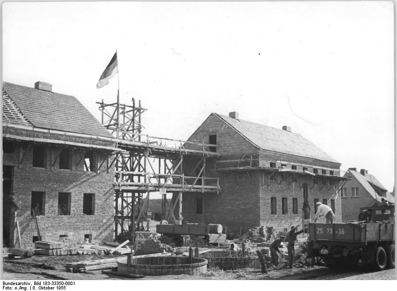 Martinskirchen, Bau von Wohnhäusern der MTS Zentralbild Lausitzer Rundschau 2 Motive 8.10.1955 Vorbildliche Wohnbauten für die Traktoristen der MTS Martinskirchen. Zwei moderne Vierfamilienhäuser für die Traktoristen der Maschinen-Traktoren-Station Martinskirchen im Kreis Liebenwerda sind gegenwärtig im Bau. Ein weiteres Gebäude, mit einem Speisesaal und einer Großküche für 250 Personen sowie mit Unterkünften für 12 Traktoristen ist kürzlich fertiggestellt worden. UBz: Die beiden Vierfamilienhäuser